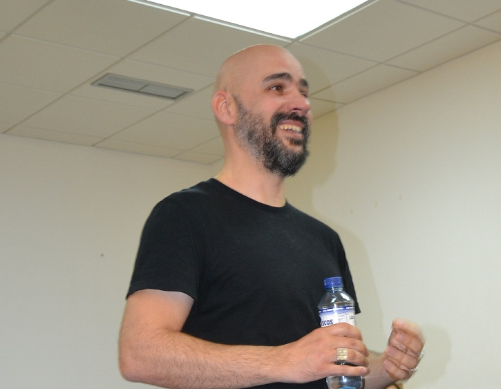 Afonso Cruz en la Universidad de Extremadura.